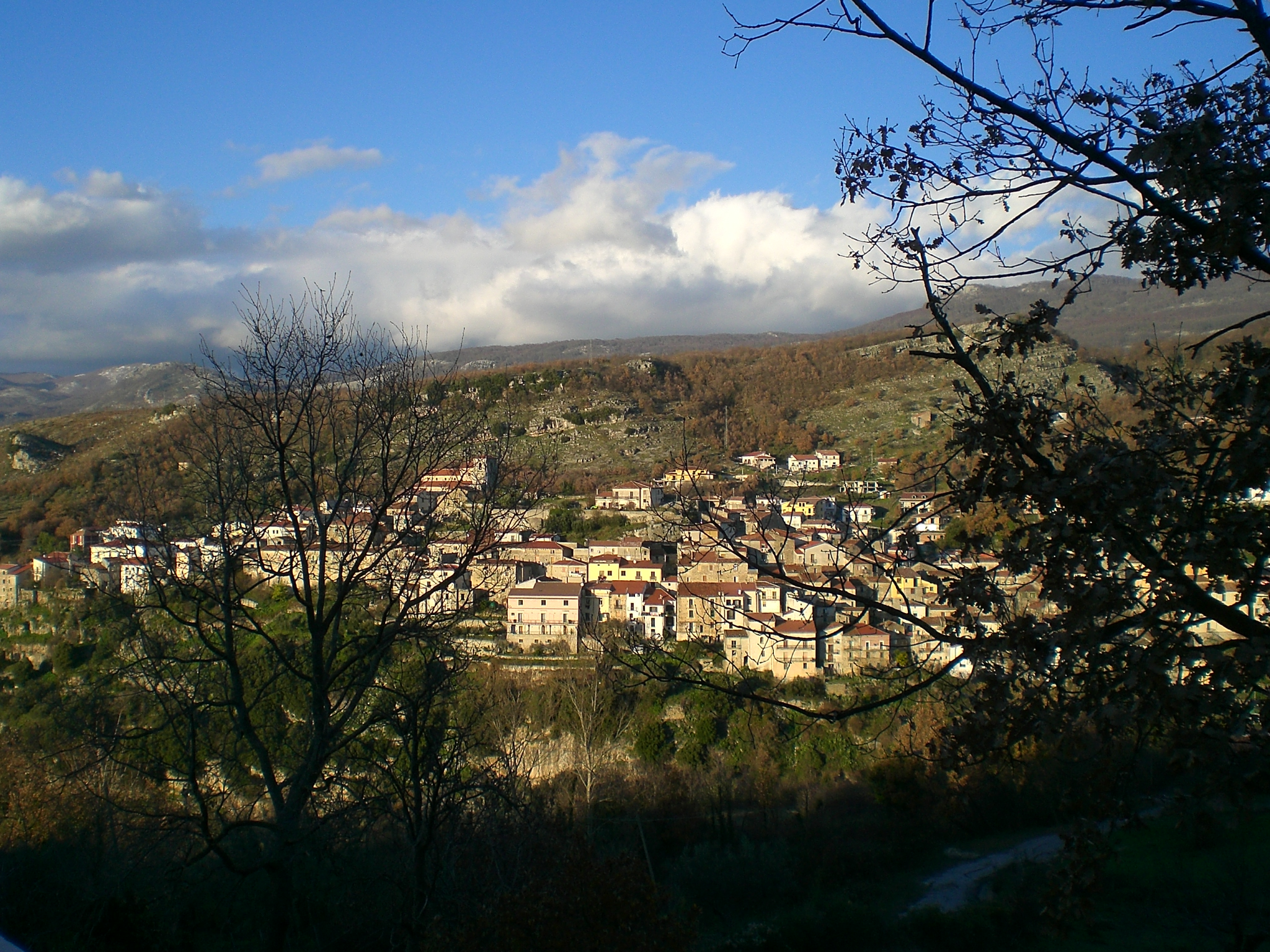 Veduta di Corleto Monforte